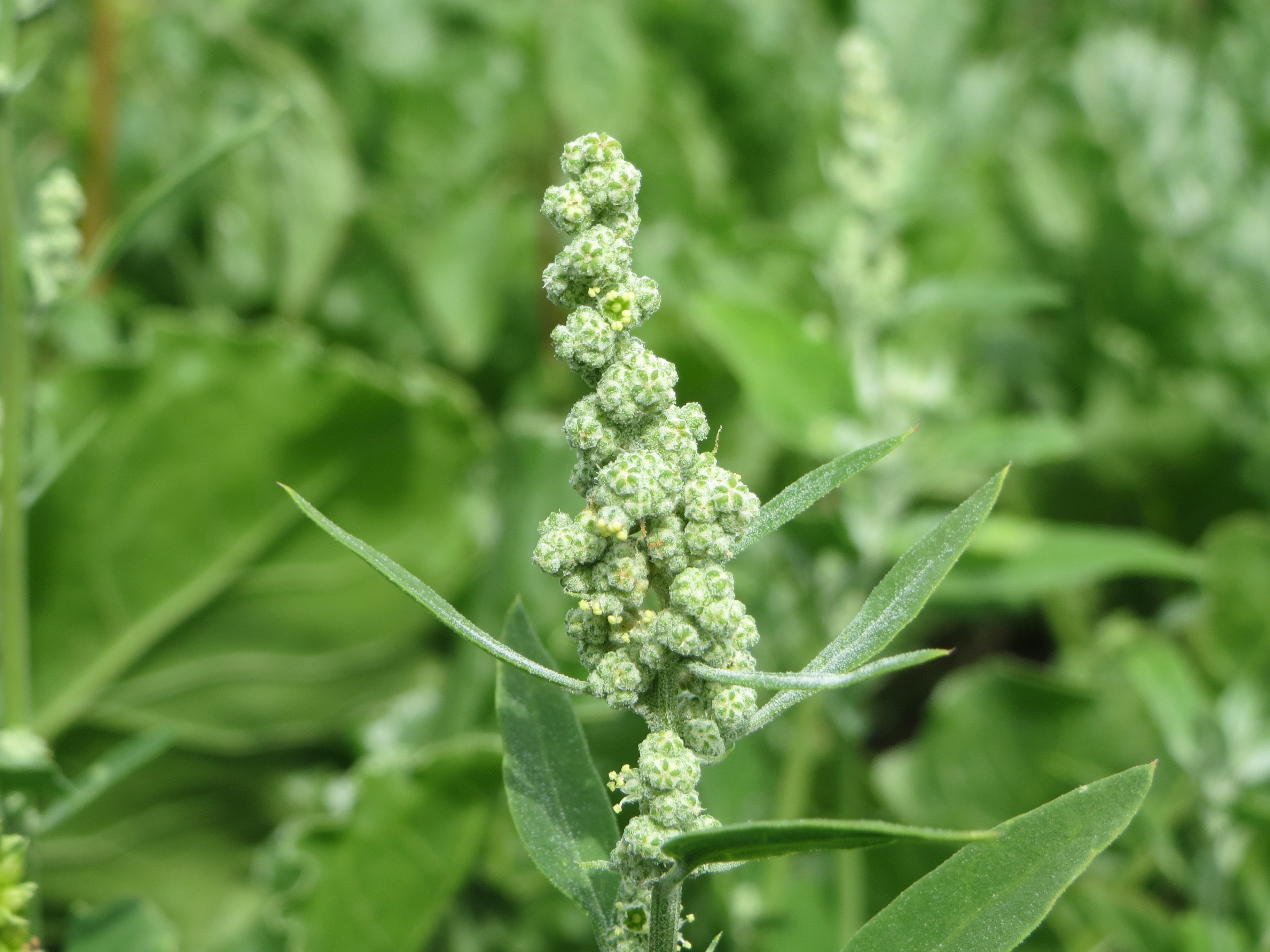 Weißer Gänsefuß (Chenopodium album) im Landschaftsschutzgebiet Hockenheimer Rheinbogen